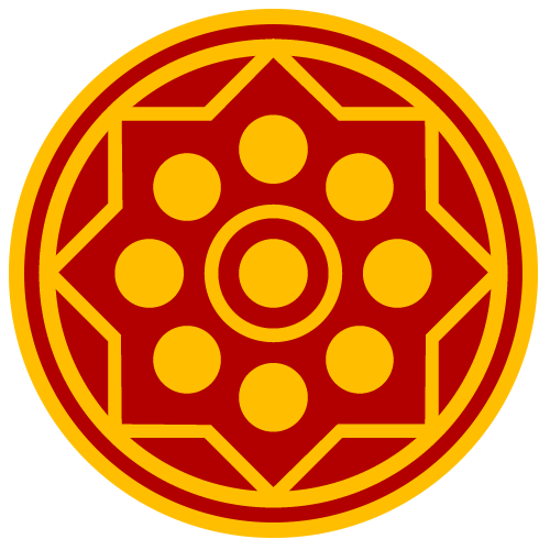 ตราแผ่นดินอยุธยาสมัยสมเด็จพระนารายณ์มหาราช ทำขึ้นใหม่จากหลักฐานเดิม